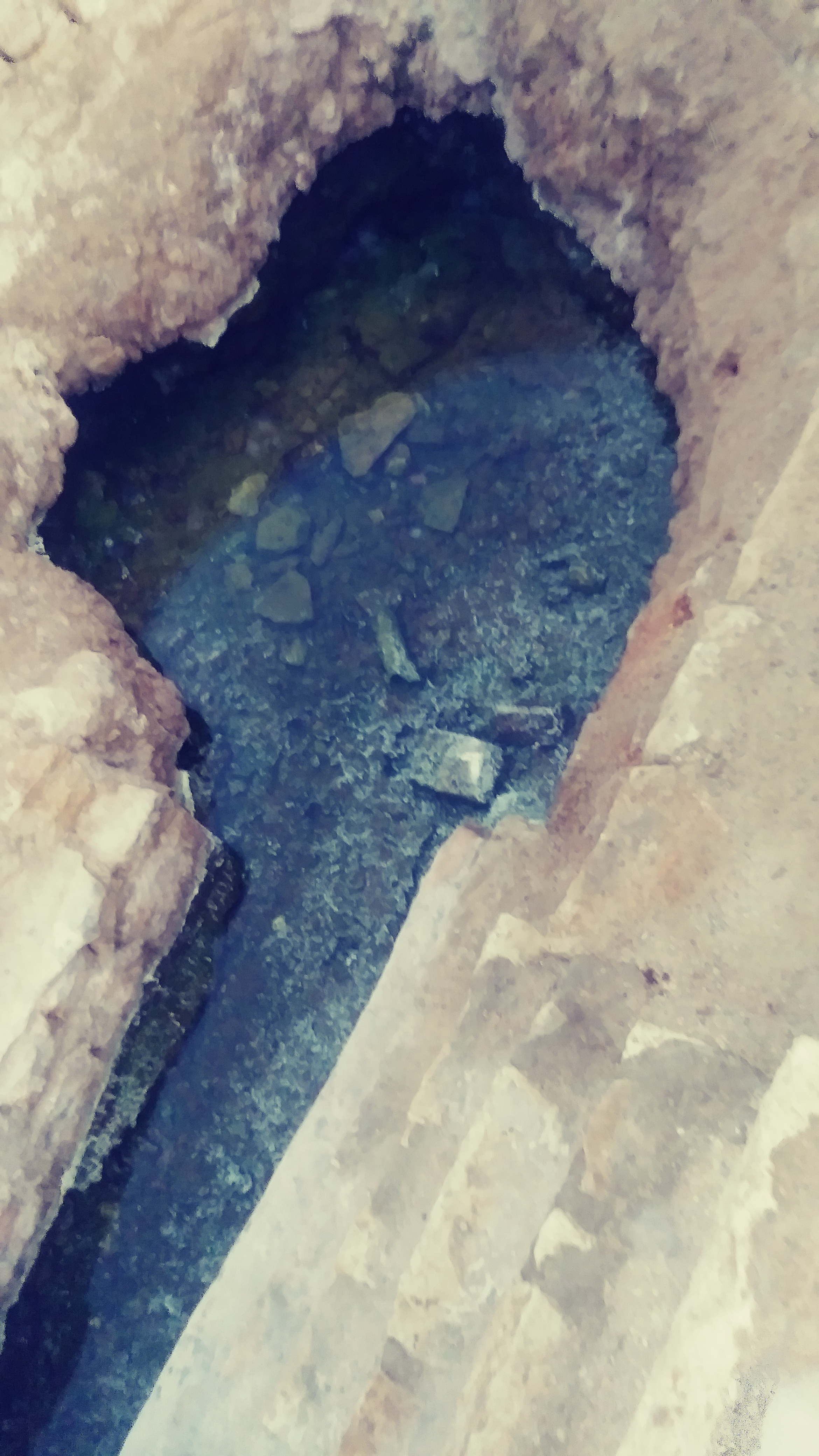 عين الروضة، عين كبريتية حارة في مدينة الحامي التي تتميز بالعديد من العيون الحارة